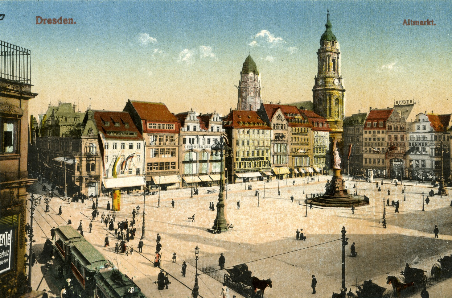 Dresden; Altmarkt This postcard is from publisher Brück & Sohn in Meißen ( postcard has a unique number 19120 and is available in a higher resolution at the publisher. This images was uploaded in a cooperation project between Wikipedians and the publisher.